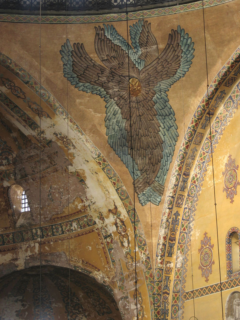 Mosaico Selyúcida representando a un ángel islámico, Hagia Sofía, Estambul.